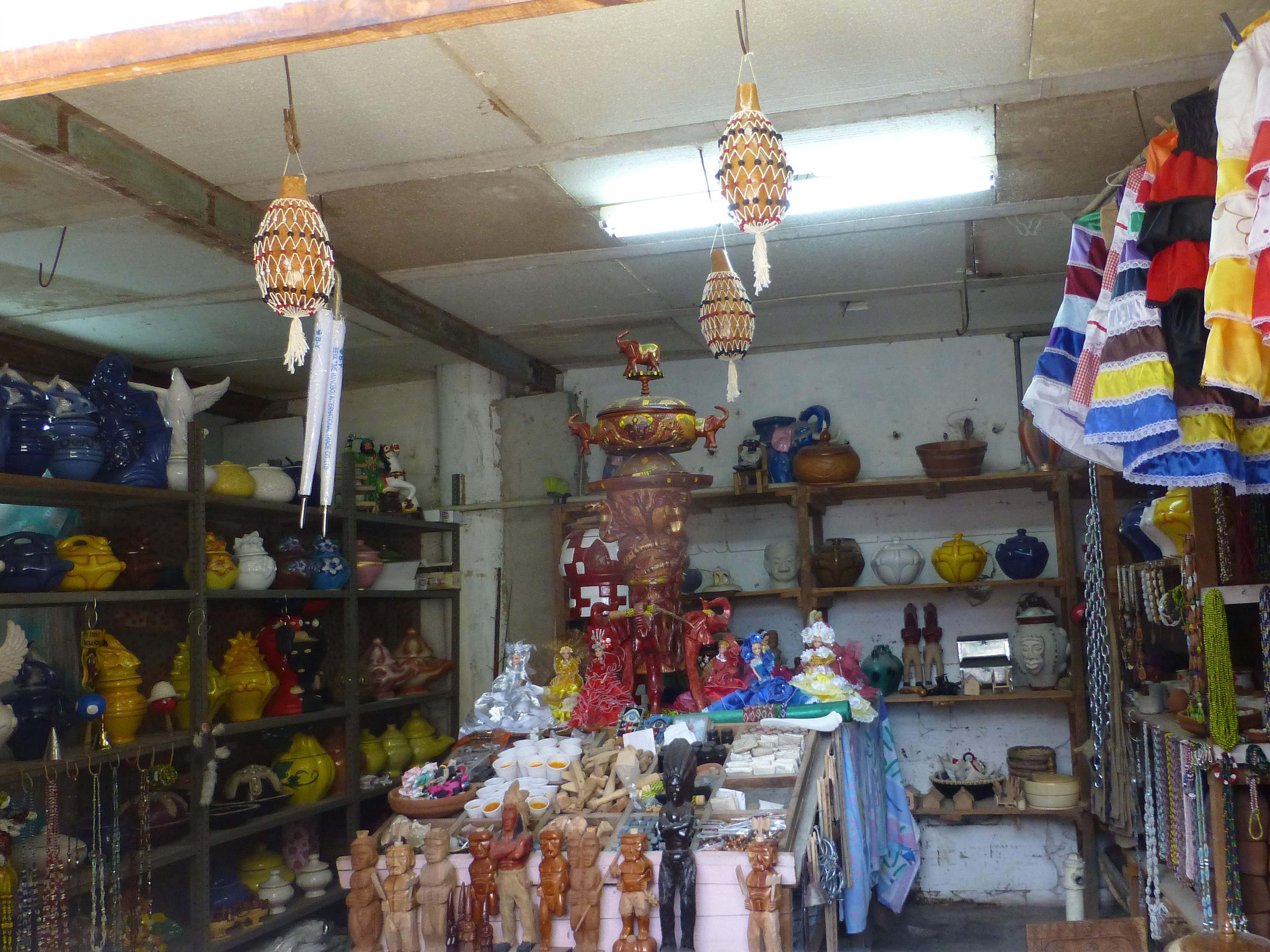 La Havane : vente d'articles religieux (Santería)